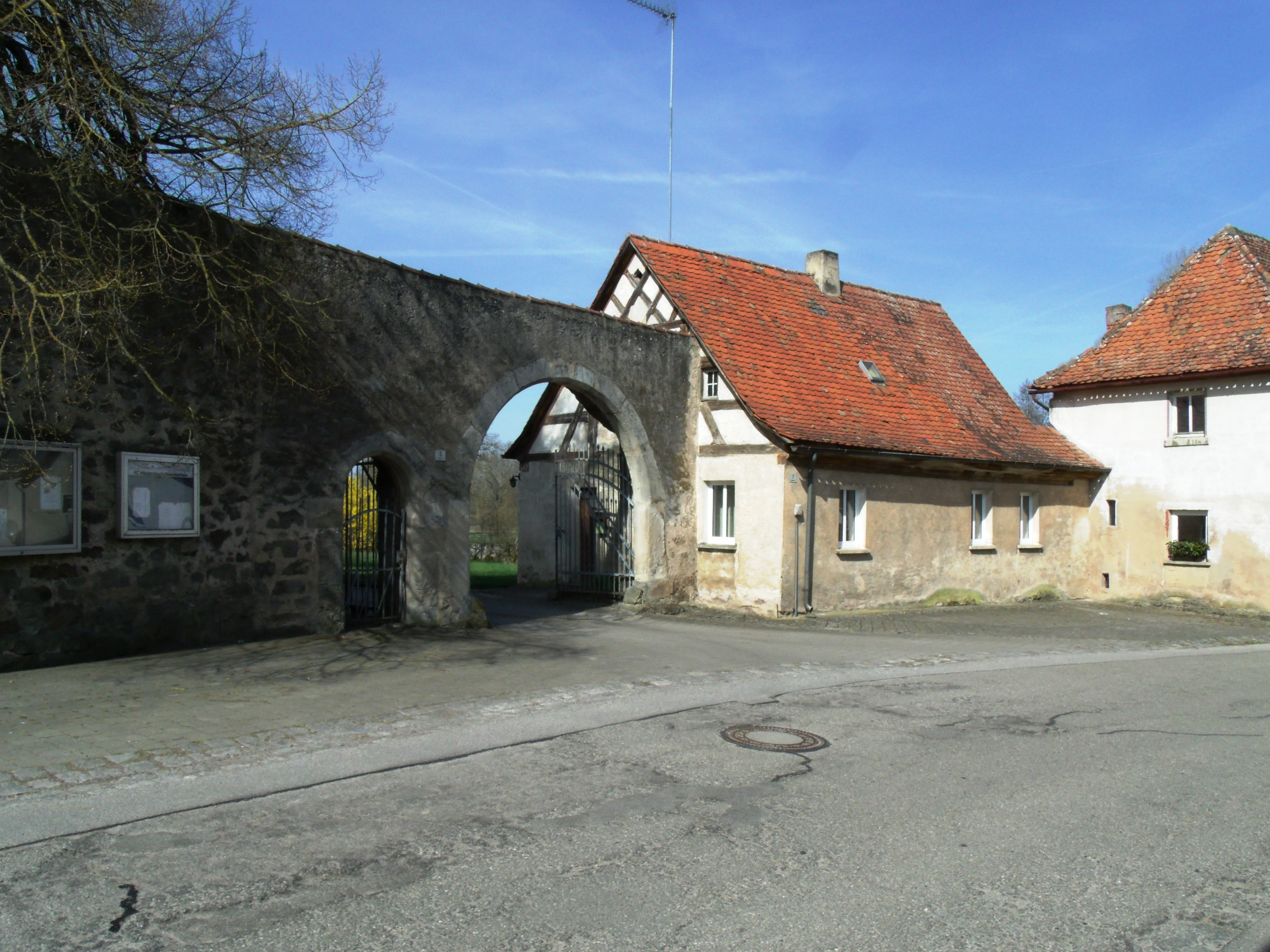 Wiedersbach, Ortsteil von Leutershausen im Landkreis Ansbach, Tor zum ehemaligen Schlossgut der Herren von Eyb mit Torwärterhäuschen